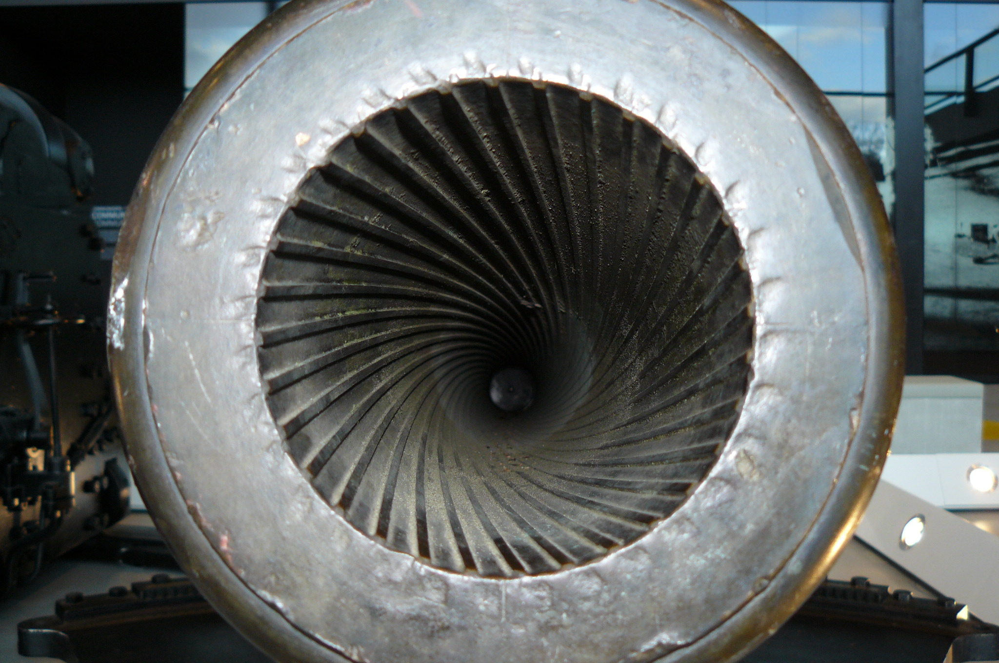 Getrokken loop met spiraalsgewijs verlopende trekken van een kanon 10cm brons. Gezien in het Nationaal Militair Museum te Soesterberg.